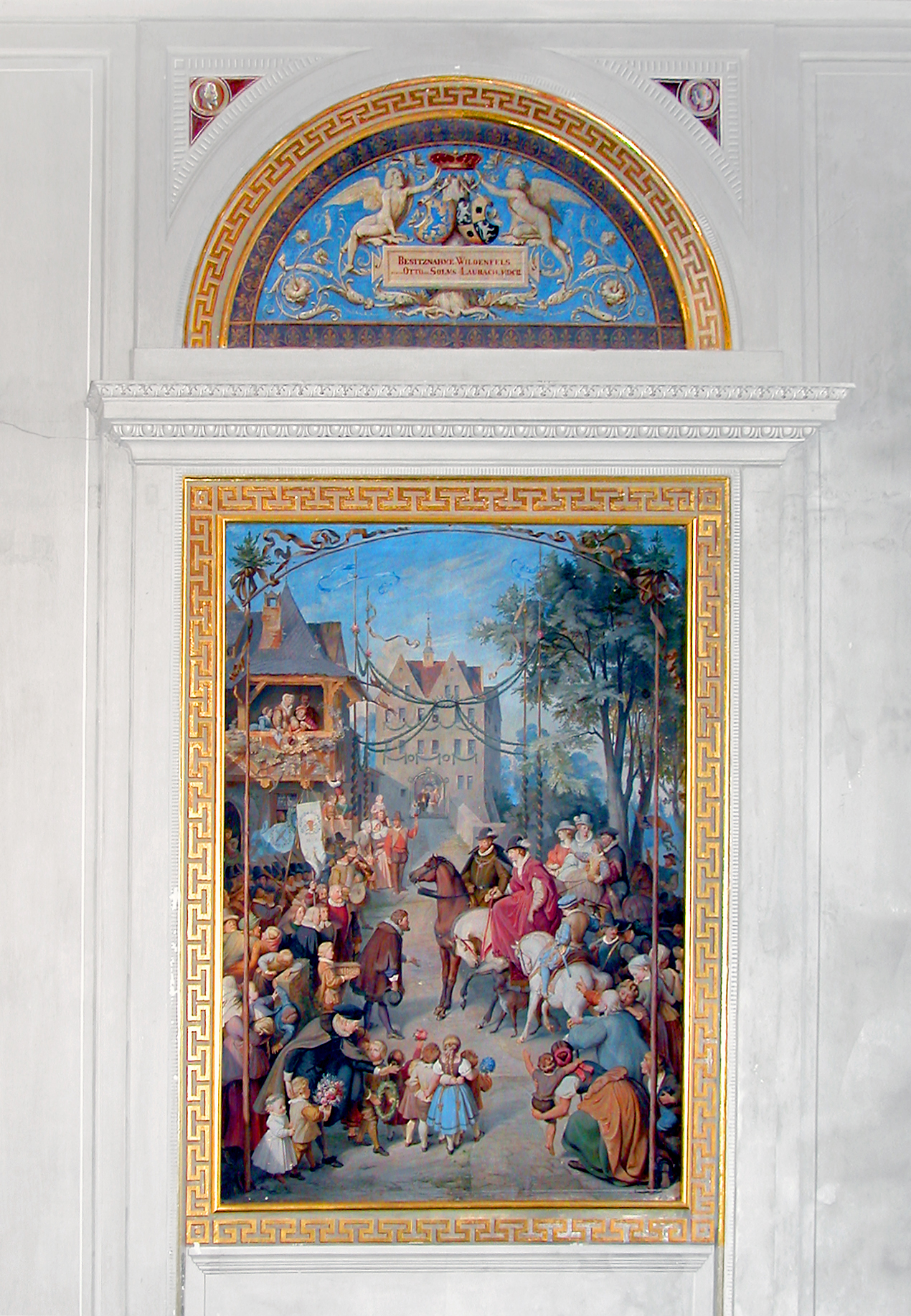 16.10.2007 08134 Wildenfels: Schloß, 1. Obergeschoß Südflügel. Ahnensaal (Trauzimmer) mit Gemälde von Theodor Grosse (1856-58): "Der Einzug der Grafen Solms in Wildenfels 1602". [DSCN30825.TIF]20071016770DR.JPG(c)Blobelt